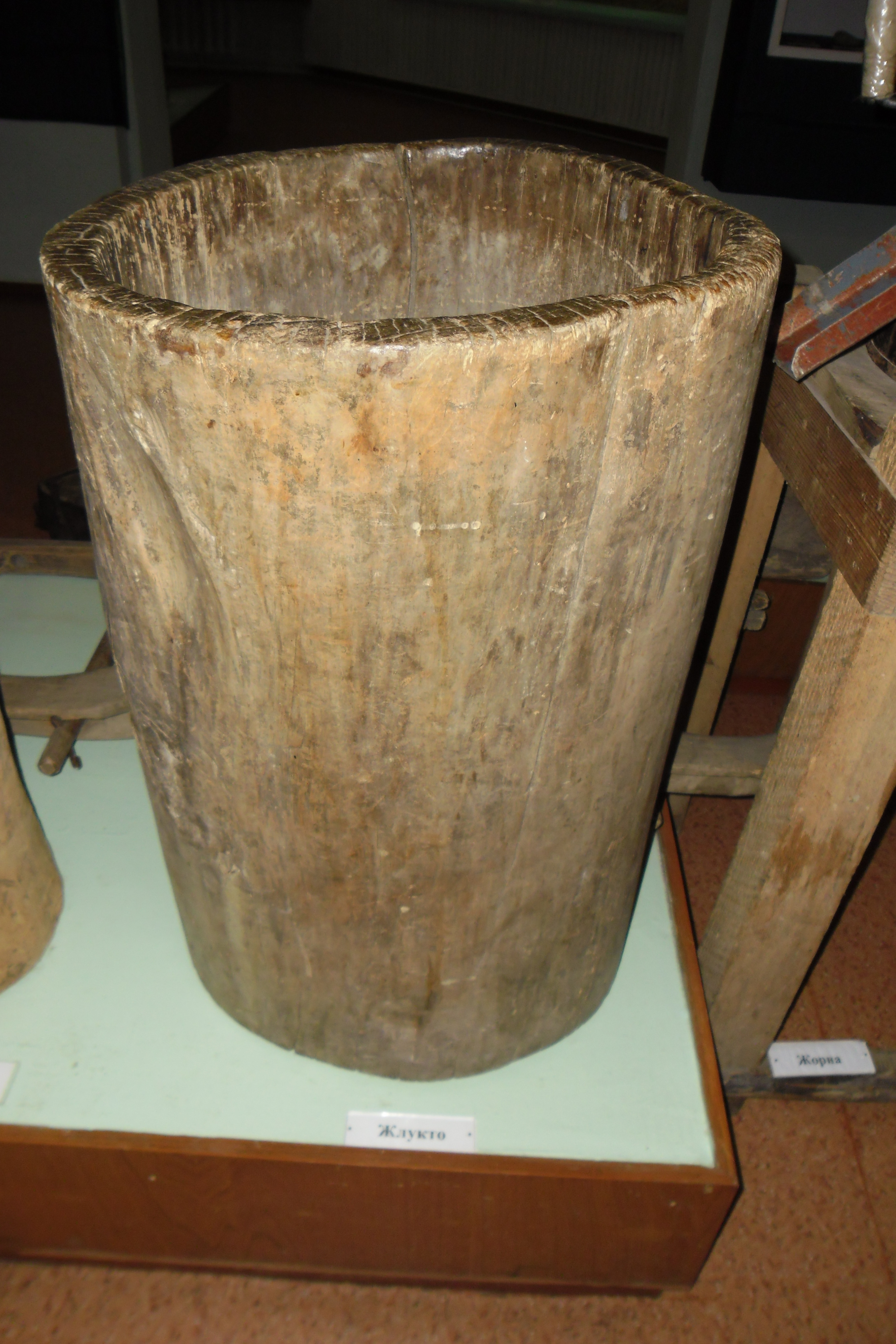 Жлукто